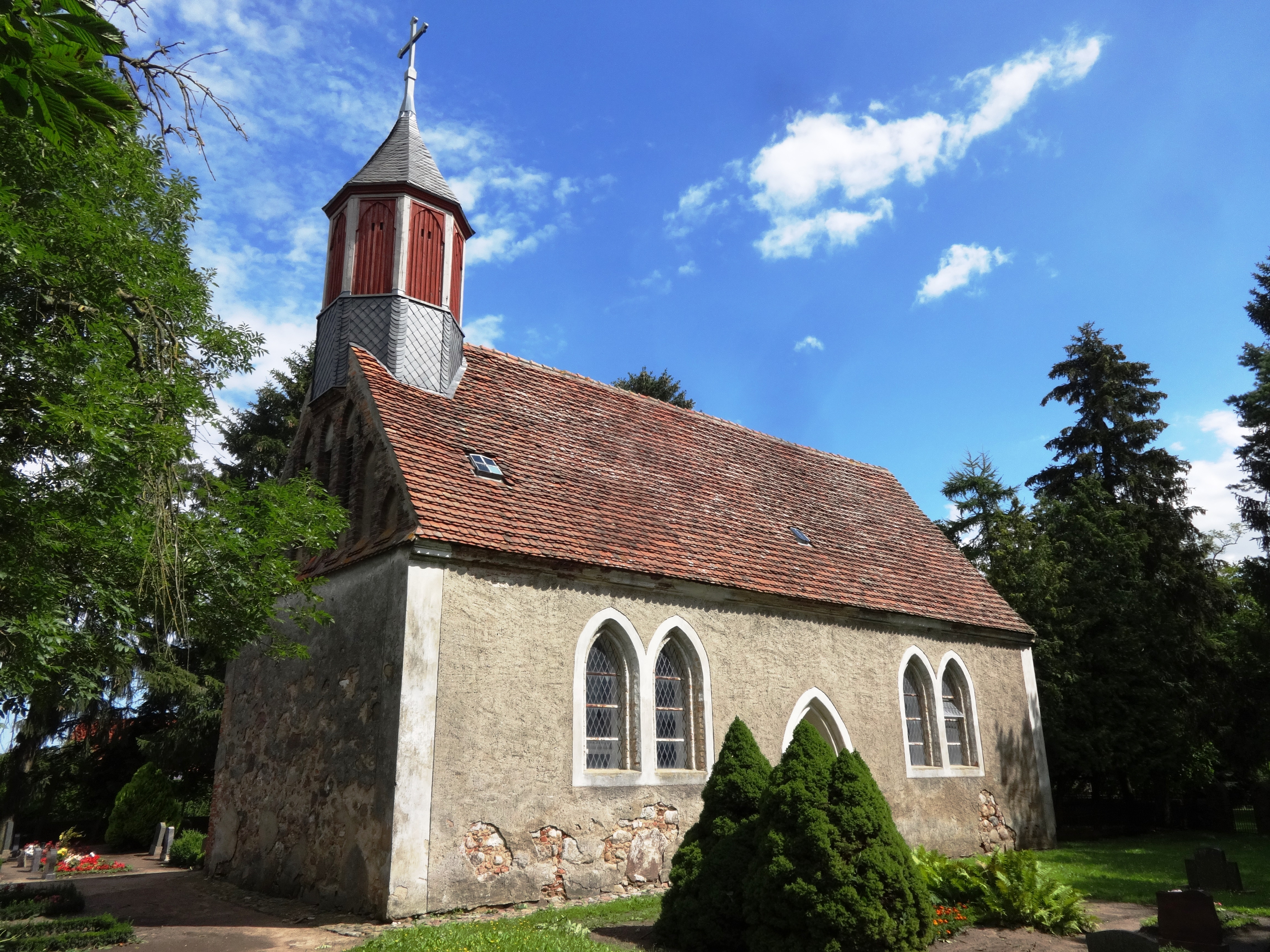 Die Feldsteinkirche in Neuenkirchen bei Anklam entstand vermutlich in der zweiten Hälfte des 13. Jahrhunderts. In seinem Innern steht vor dem Altar eine Grabplatte von Johannes Lughe mit seiner Frau. Das Epitaph stammt aus dem Ende des 14. Jahrhunderts.